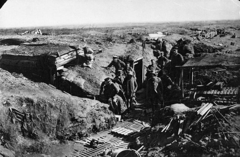 Die große Schlacht im Westen. Gestürmte englische Linien bei Bullecourt - Croise[i]lles Zeichnet Kriegsanleihe!